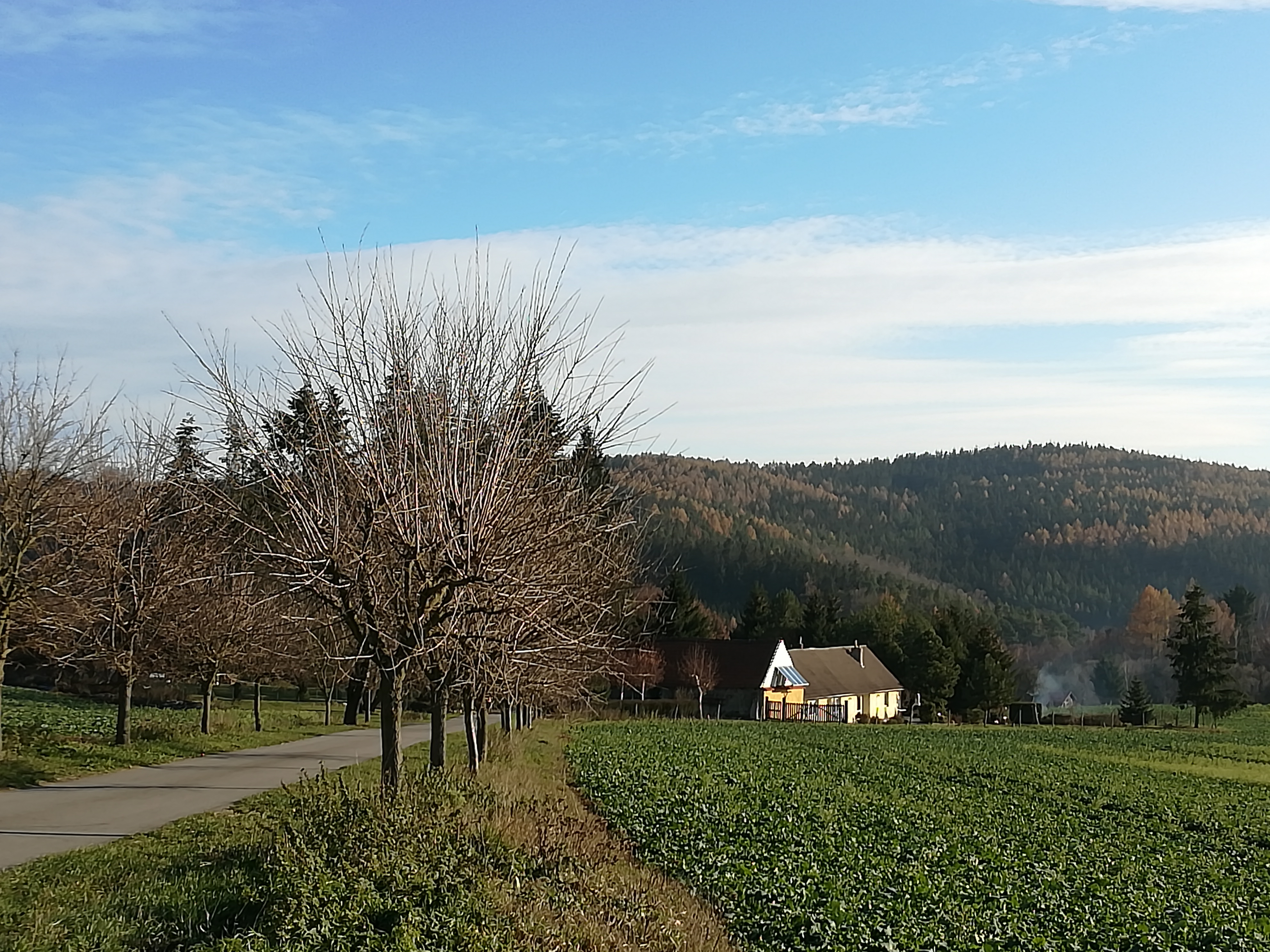 Vesnice Pařezí, část obce Chotýšany v okrese Benešov. Příjezd od Chotýšan